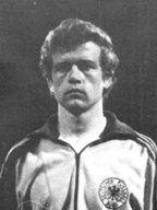 Friedhelm Haebermann, Edgar Schneider und Jürgen Kalb vor dem Amateur-Länderspiel am 7. September 1971 in München gegen Bulgarien